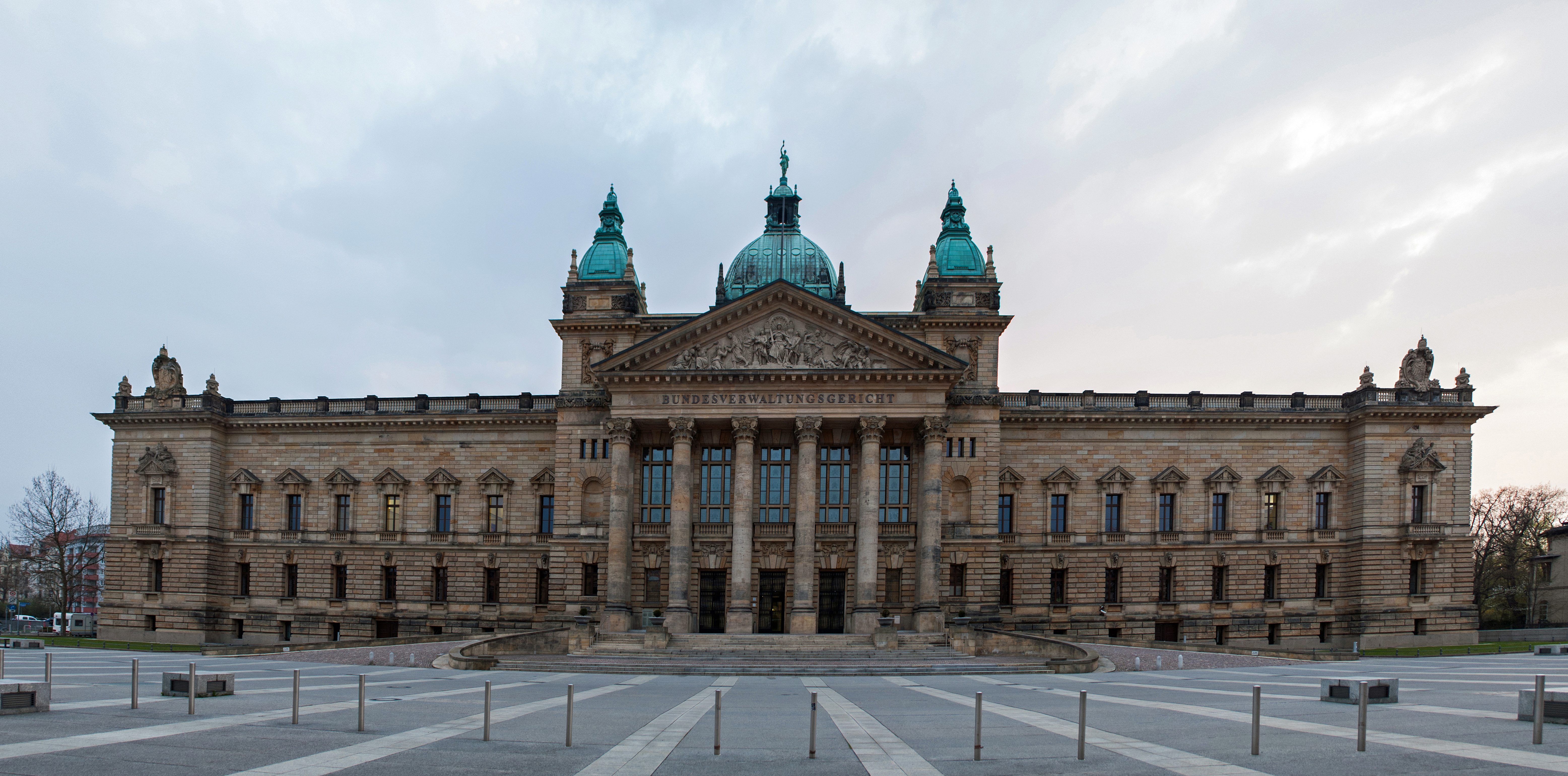 Das Bundesverwaltungsgericht in Leipzig. Simsonplatz 1 04107 Leipzig